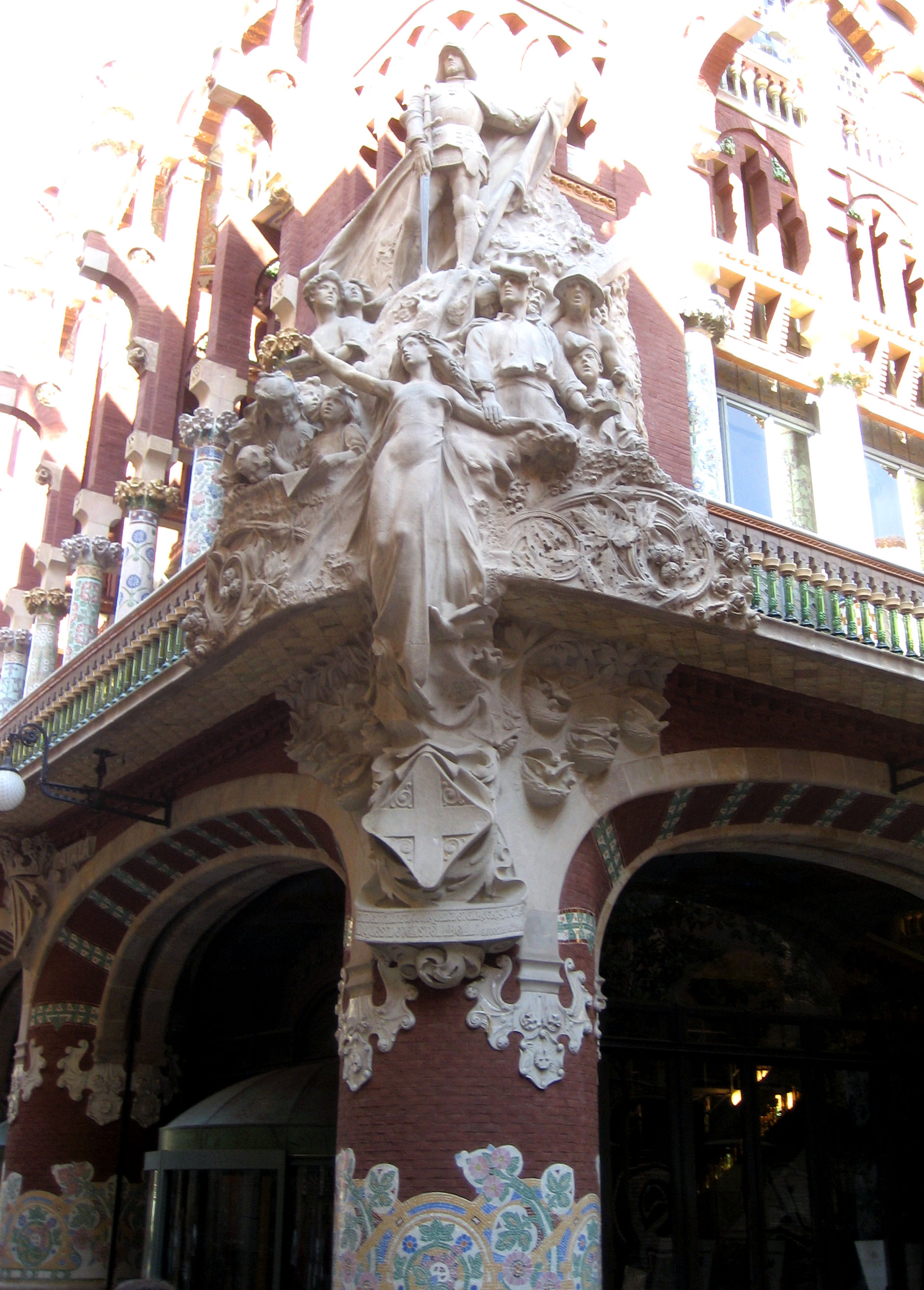 Entrada primitiva del Palau de la Música Catalana en Barcelona